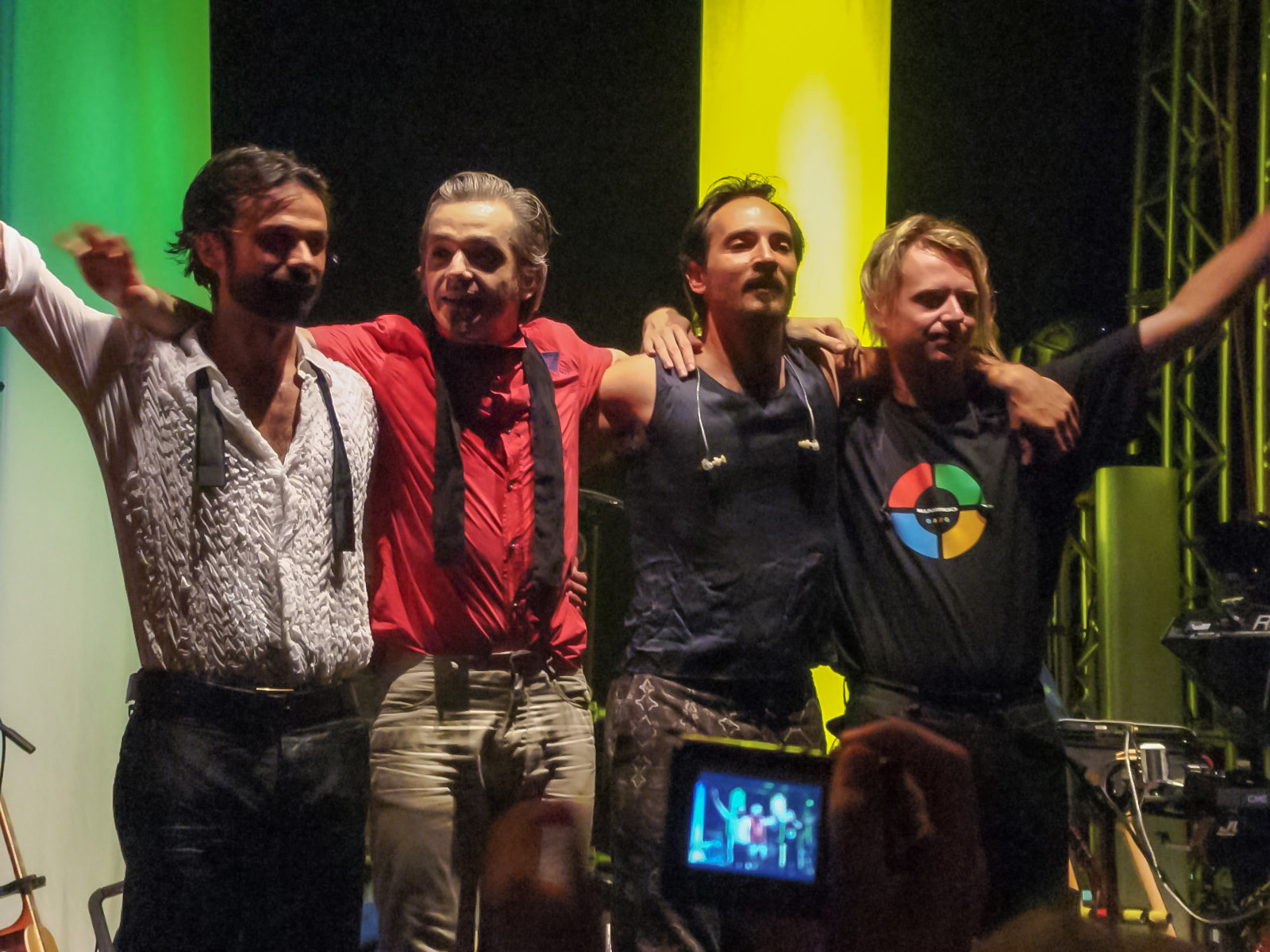 Bluvertigo in 2008.